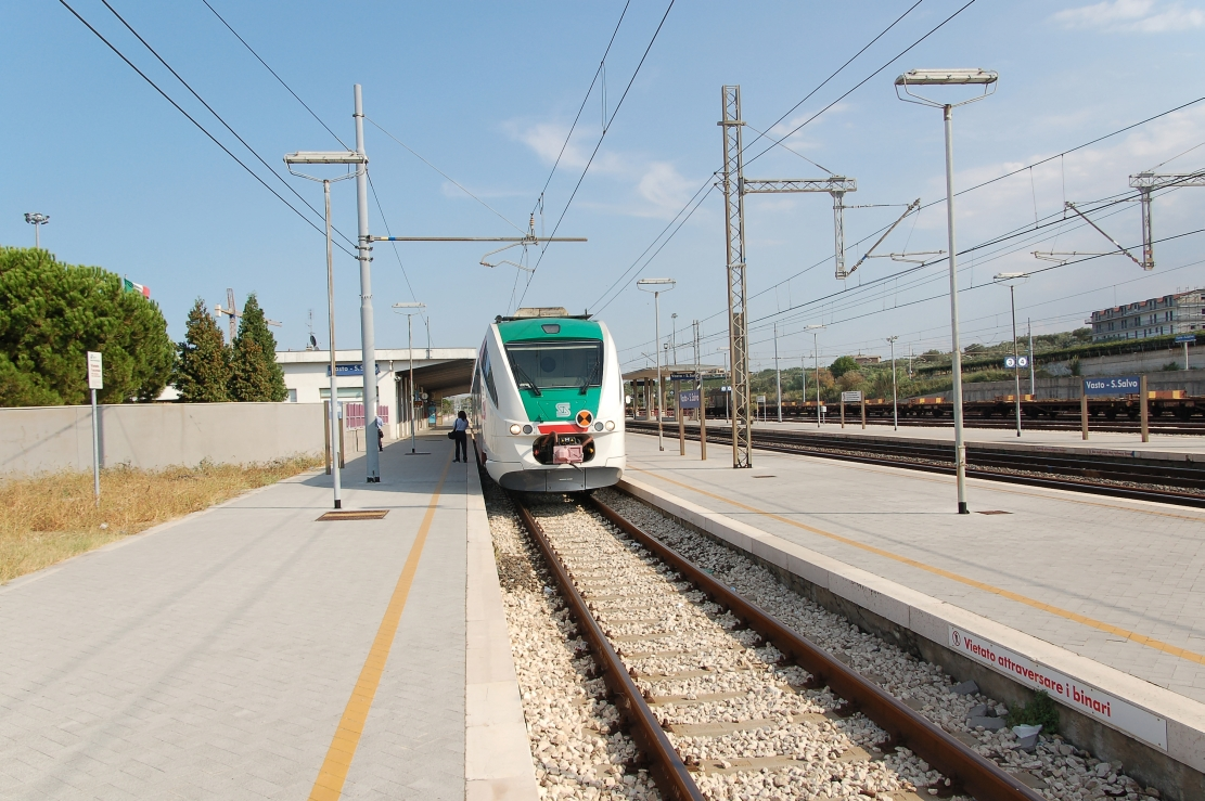 Vasto train